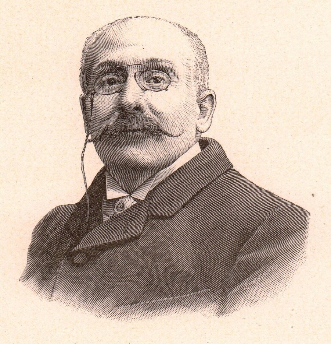 Léon Frapié (Album Mariani)